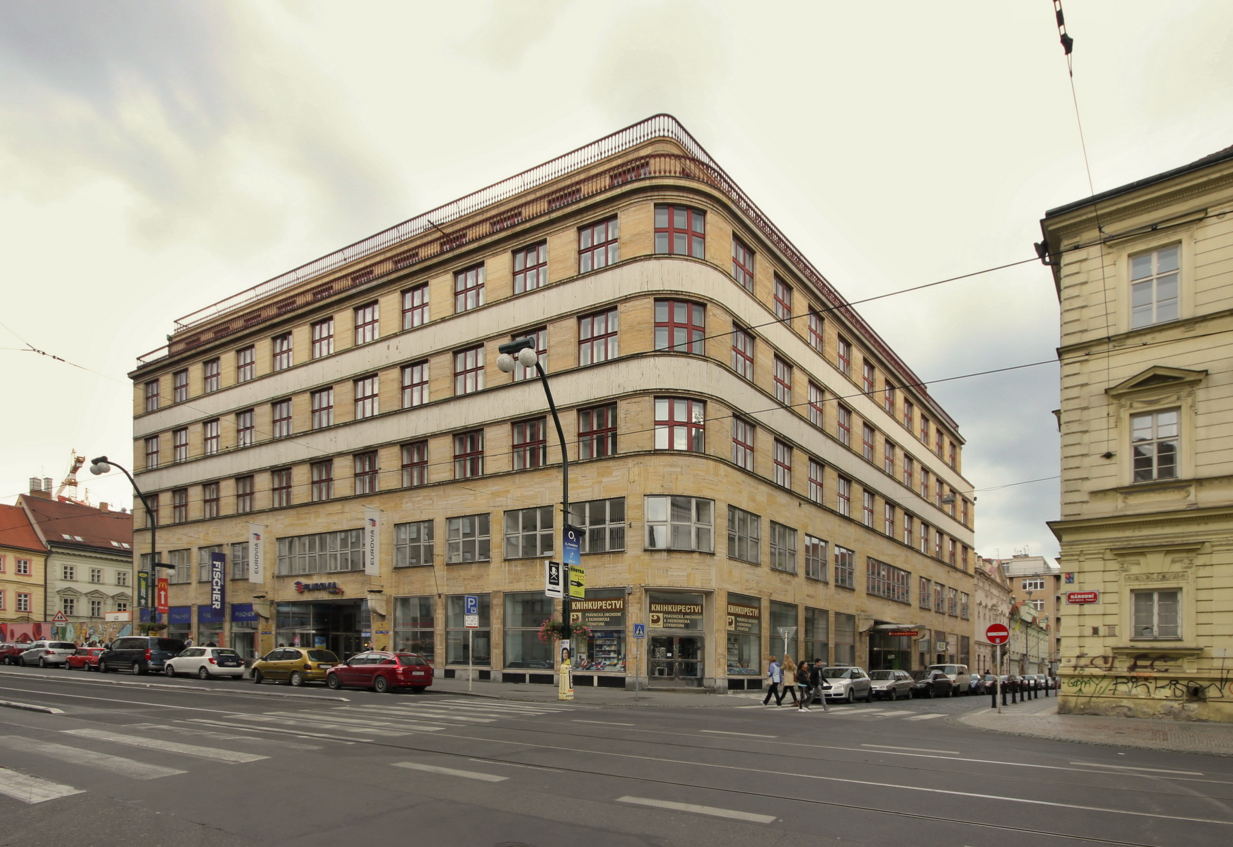 Adolf Foehr: Palác Dunaj, Praha 1- Nové Město, č. p. 138. Národní 10, Voršilská 14.